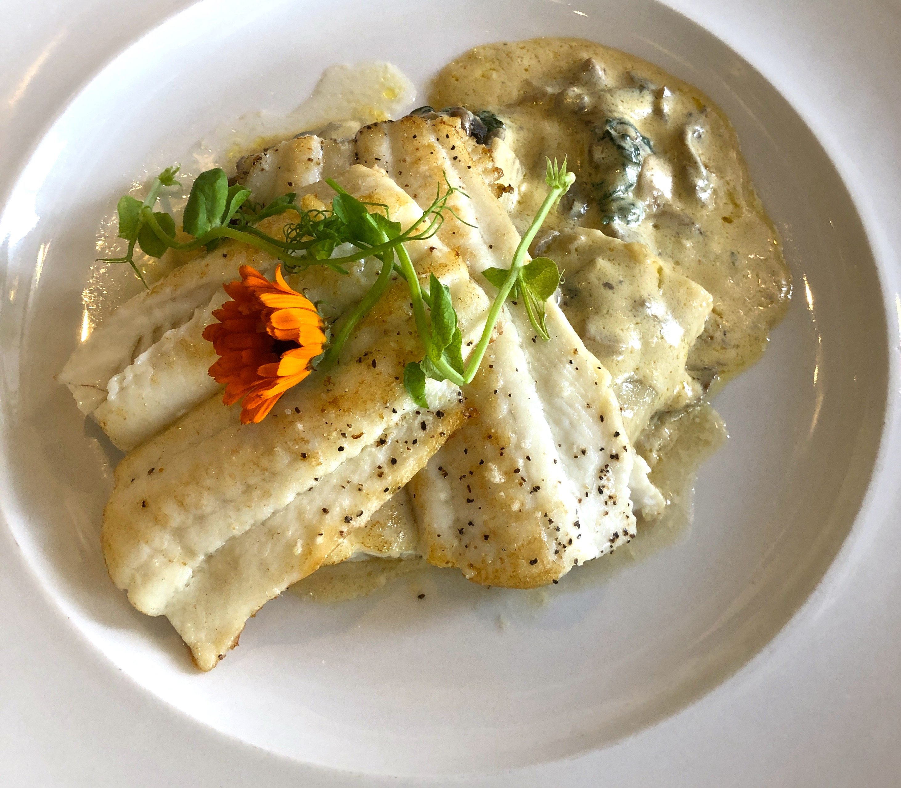 Schollenfilet-Abschnitte, gebraten.Hier in einem Fischrestaurant in Lyme Regis, England.